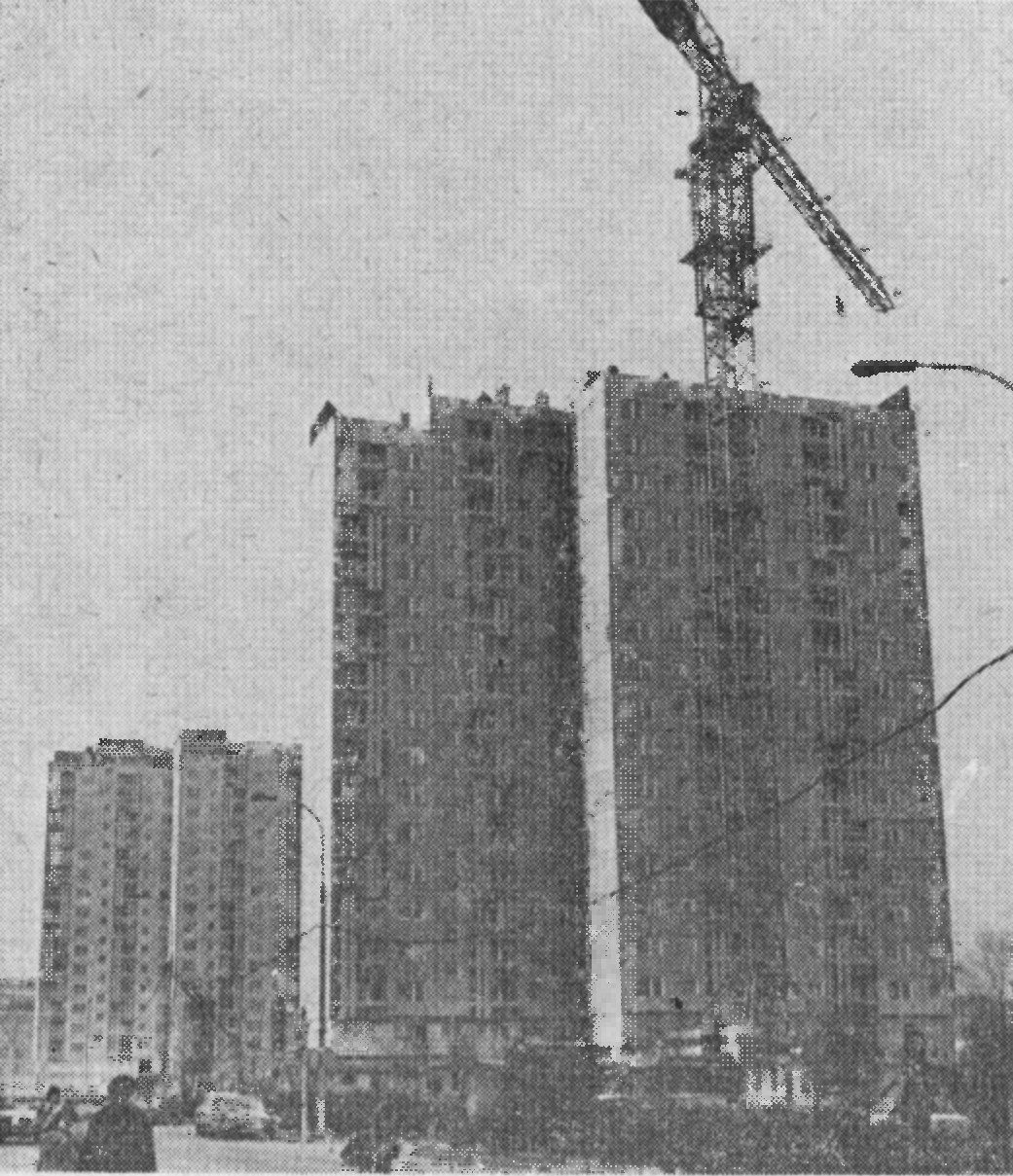 os. Rzeczypospolitej budynek nr 1 (16-kond.) i nr 3 (16-kond., w głębi) - 10 grudnia 1977